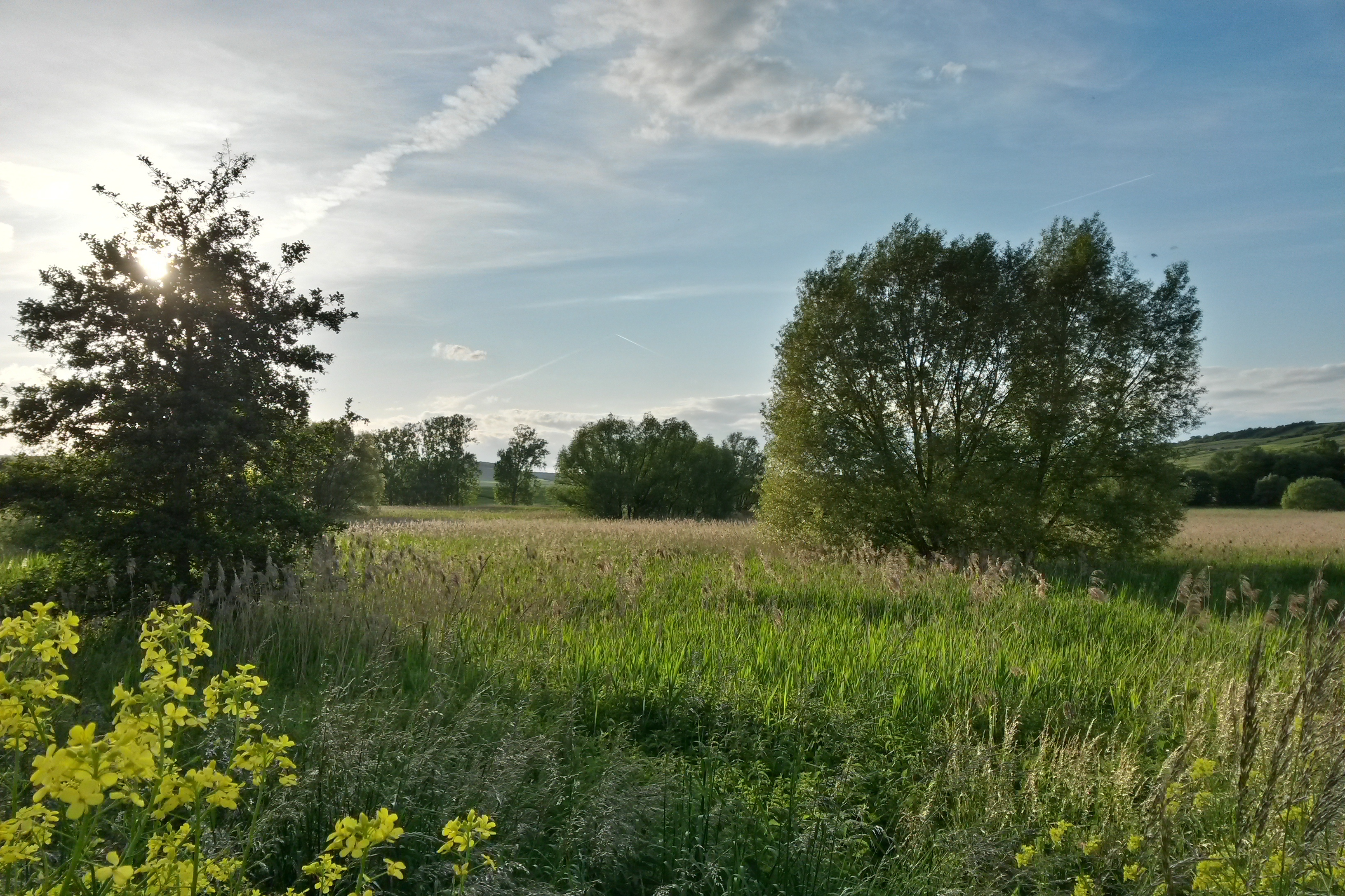 Naturschutzgebiet Im Mayen im Landkreis-Mainz-Bingen (Engelstadt): Blick von der Südspitze des Gebiets auf den großflächigen Röhrichtbestand mit einzelnen Gehölzen/ Bäumen.